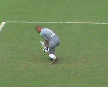 Brasilienses doelman Joao Carlos in actie tegen ABC FC.